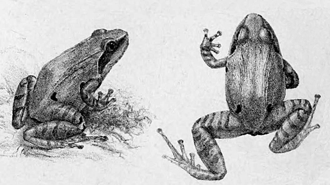 Indirana diplosticta